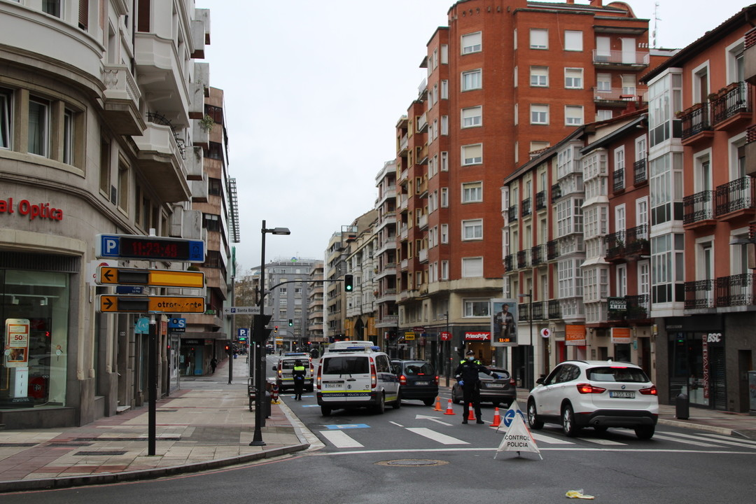 Gasteizko Aleak egindako argazki sorta, COVID-19aren eraginez hartutako neurriena. Argazki guztiak ikusgai helbidean.